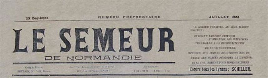 Le Semeur de Normandie, fondé par Alphonse Barbé.